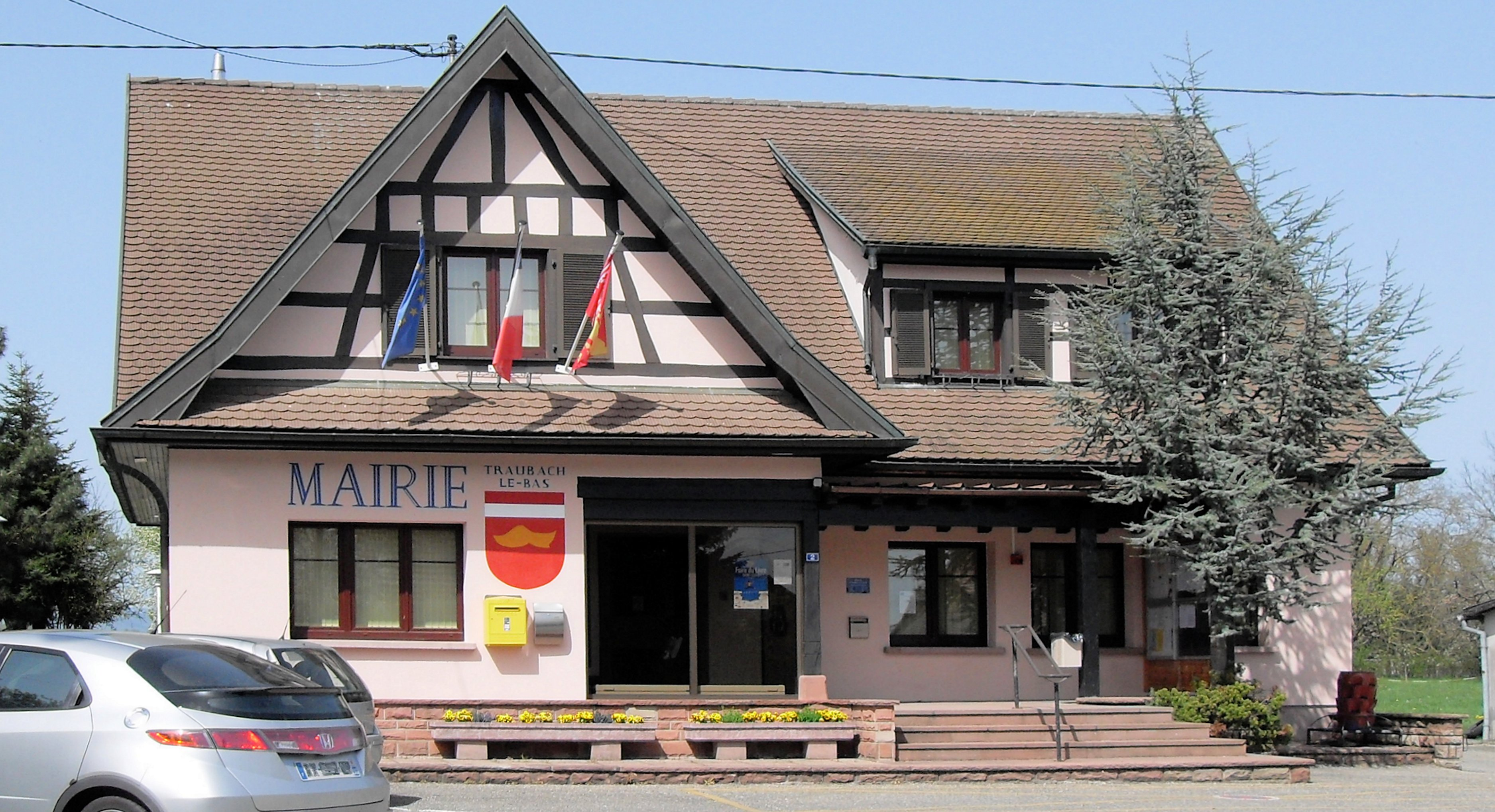 La mairie de Traubach-le-Bas